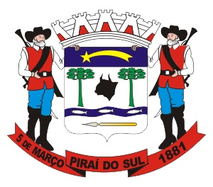 Brasão de Piraí do Sul, criado pela lei n° 391/1975